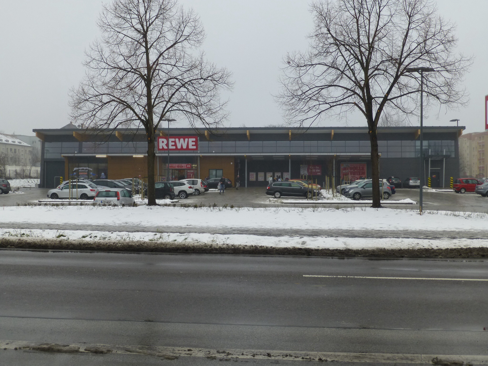 Essener Str. Ecke Rosenowstr. Rewe-Markt im Dezember 2014